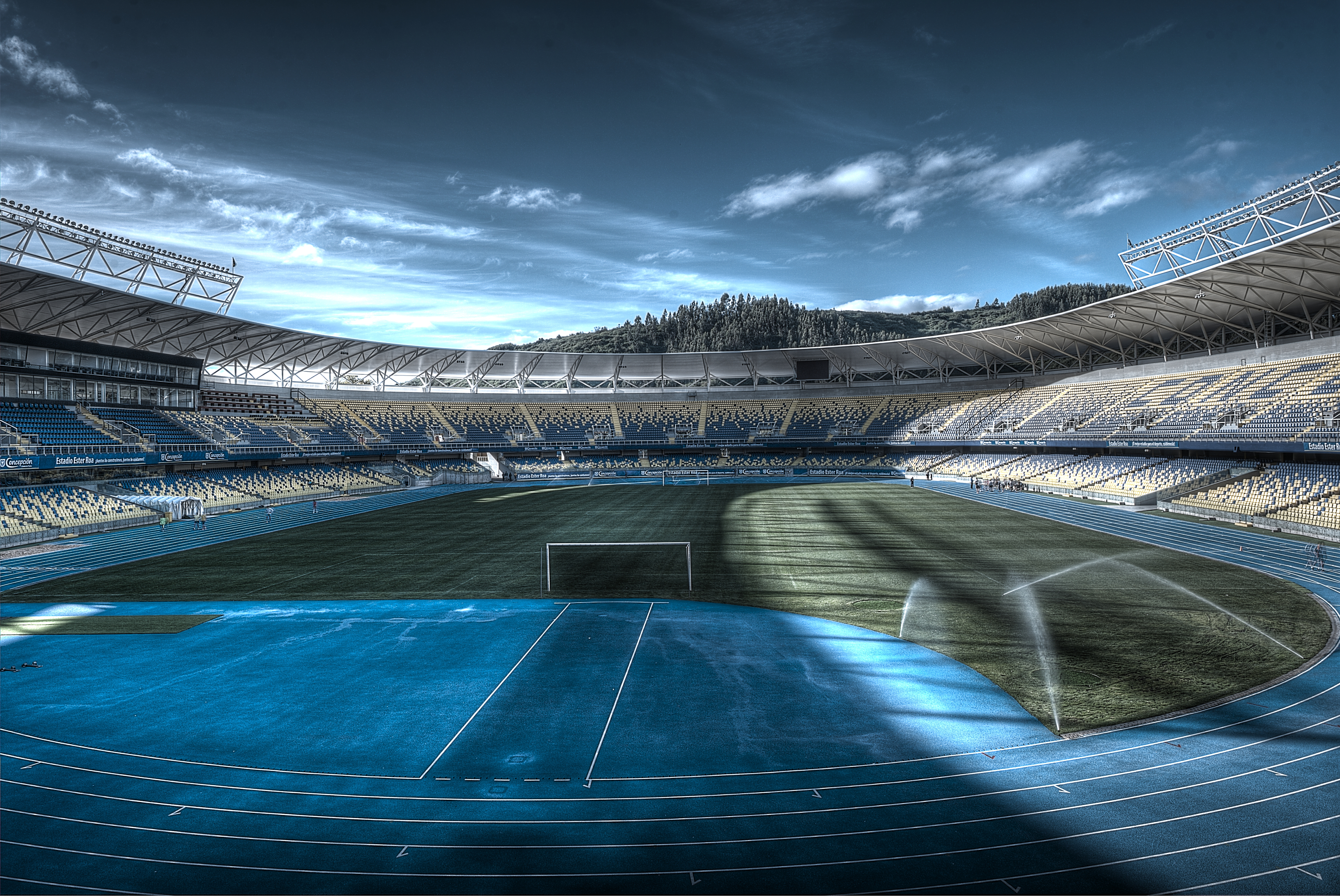 Ester Roa Stadium, Concepción, Chile.